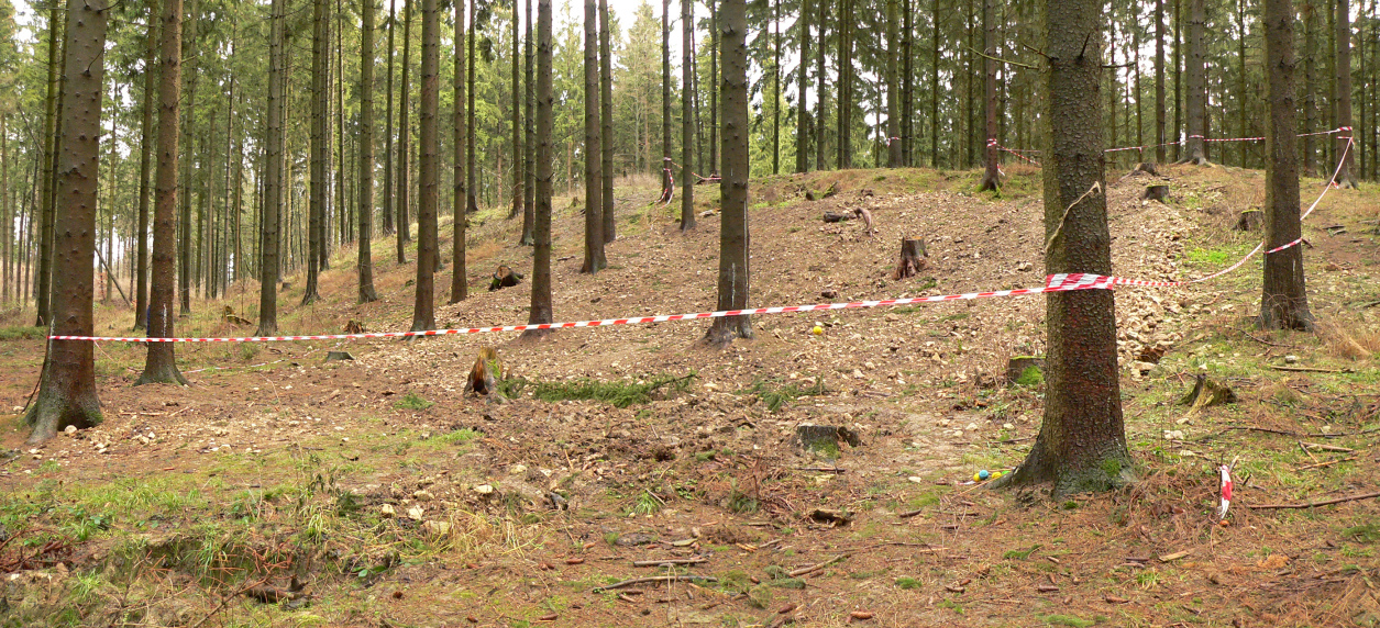 Ausgrabungsbereich am Harzhorn